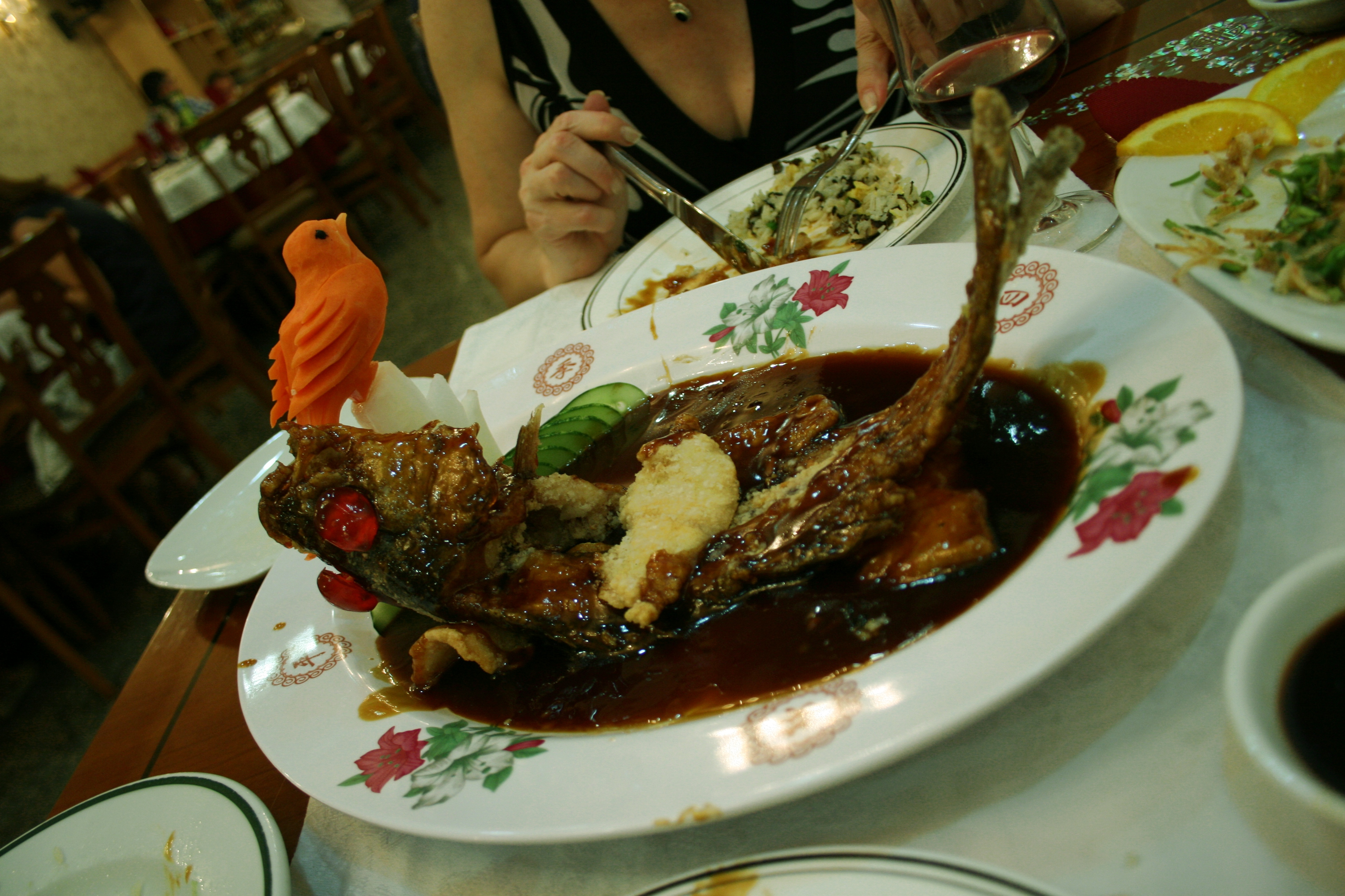 Lubina decorada en un Restaurante Chino